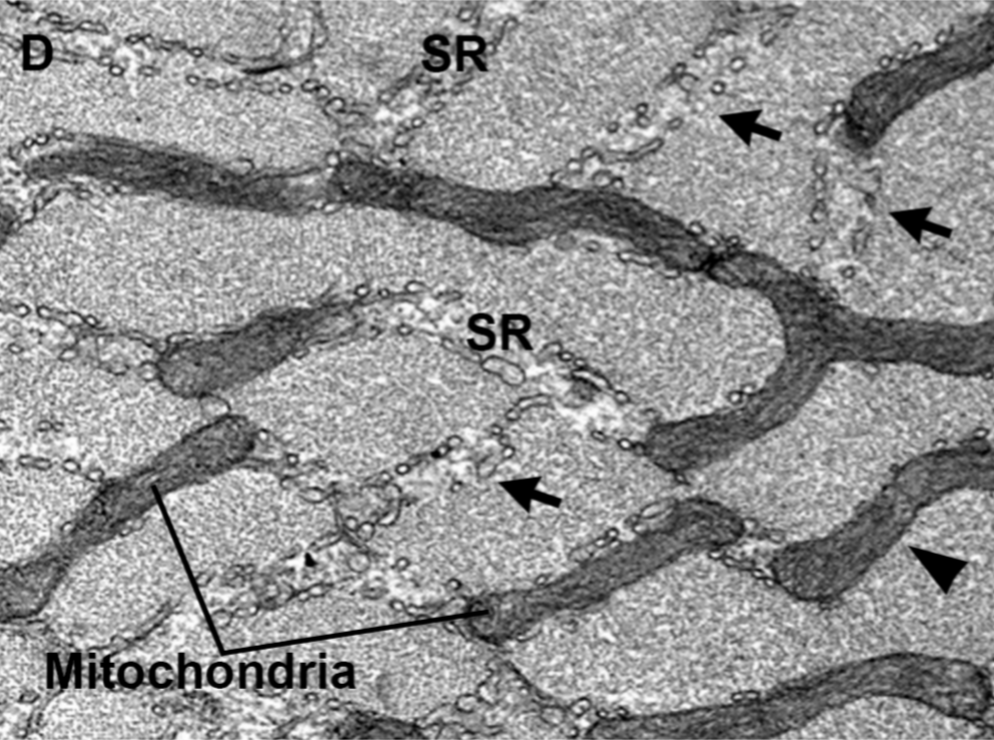 Miocito esquelético. Mitocondrias. Barra de escala: 0.5μm.